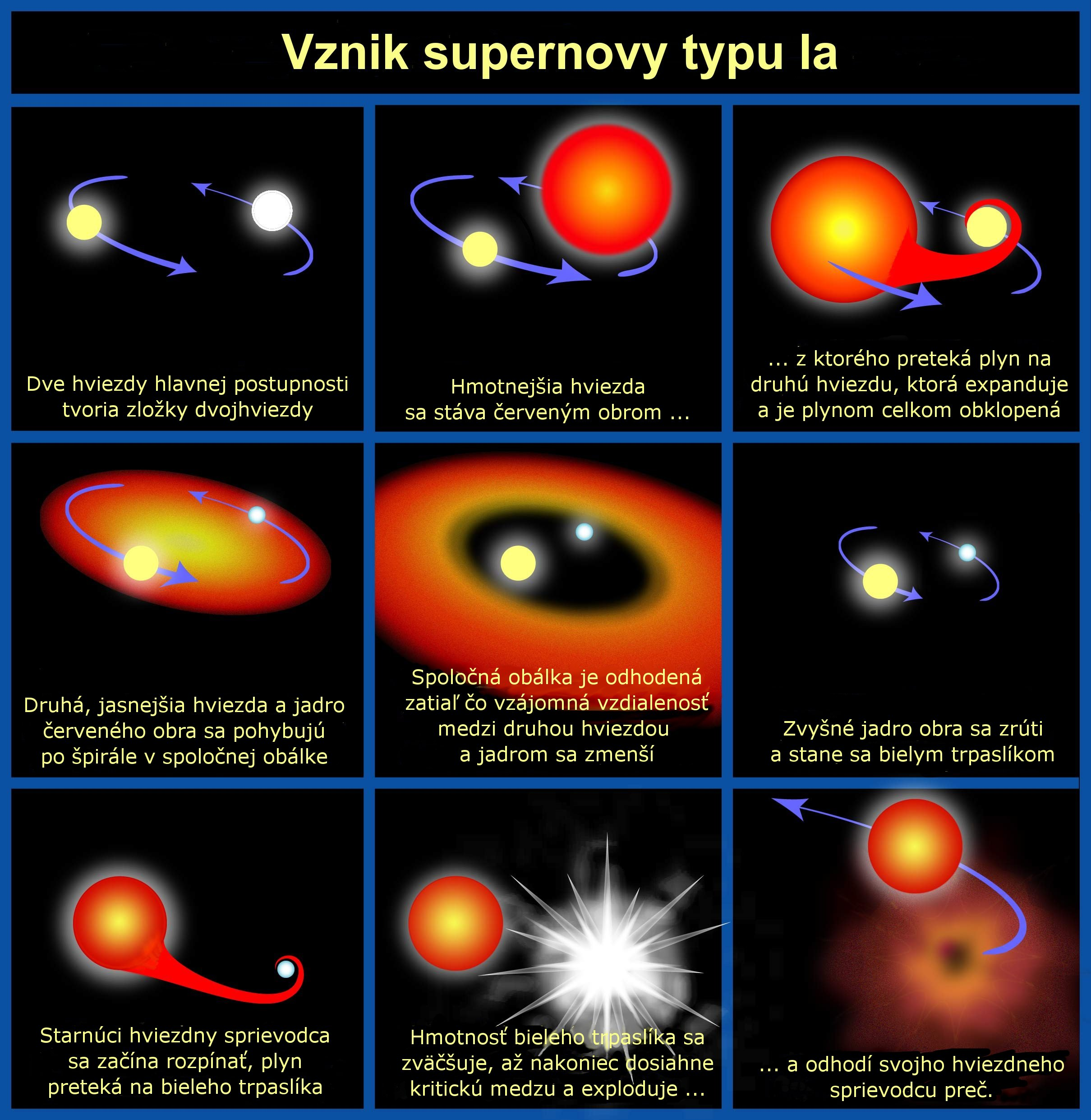 Vznik supernovy typu Ia.